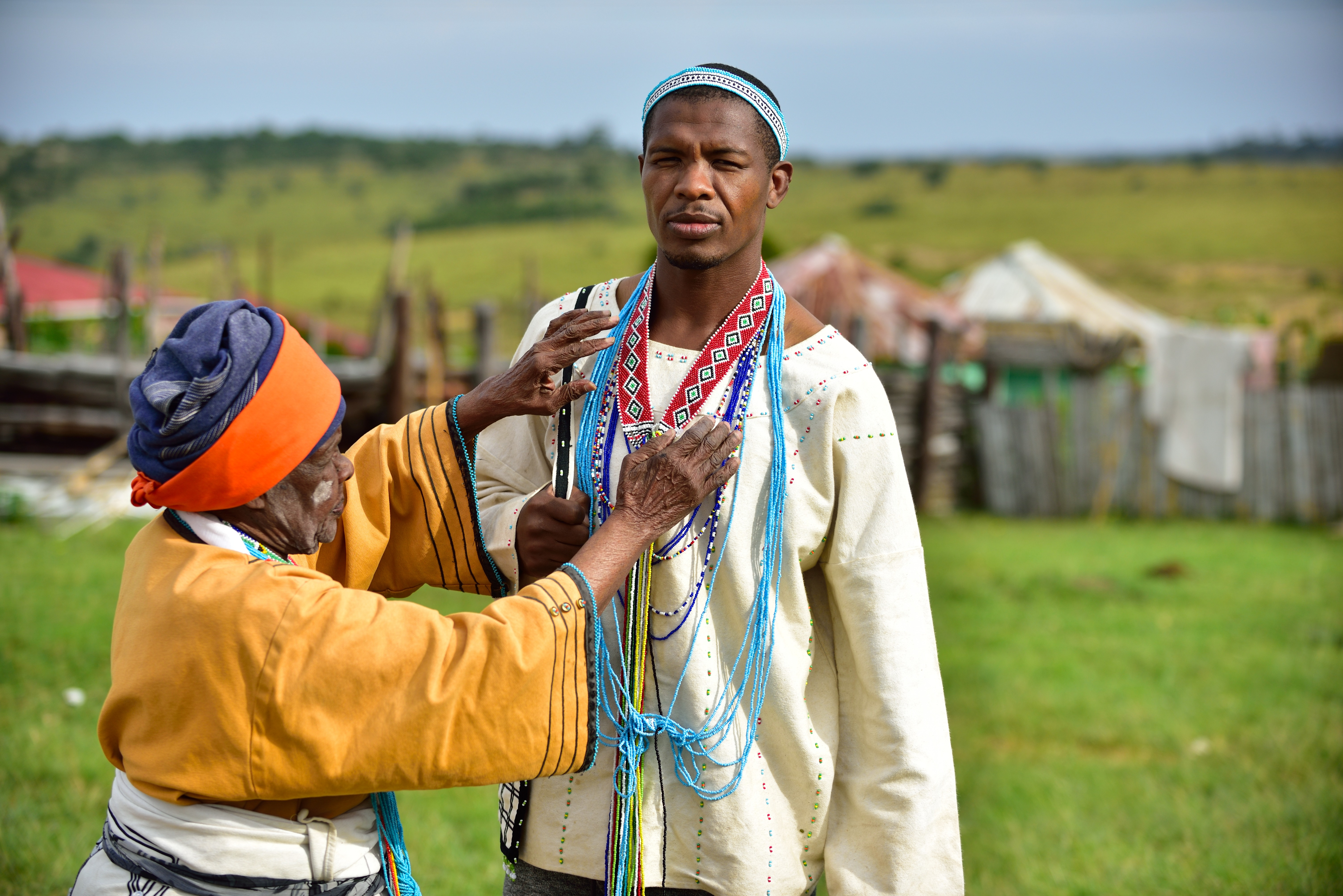 Vue de l'Eastern Cape en Afrique du Sud.